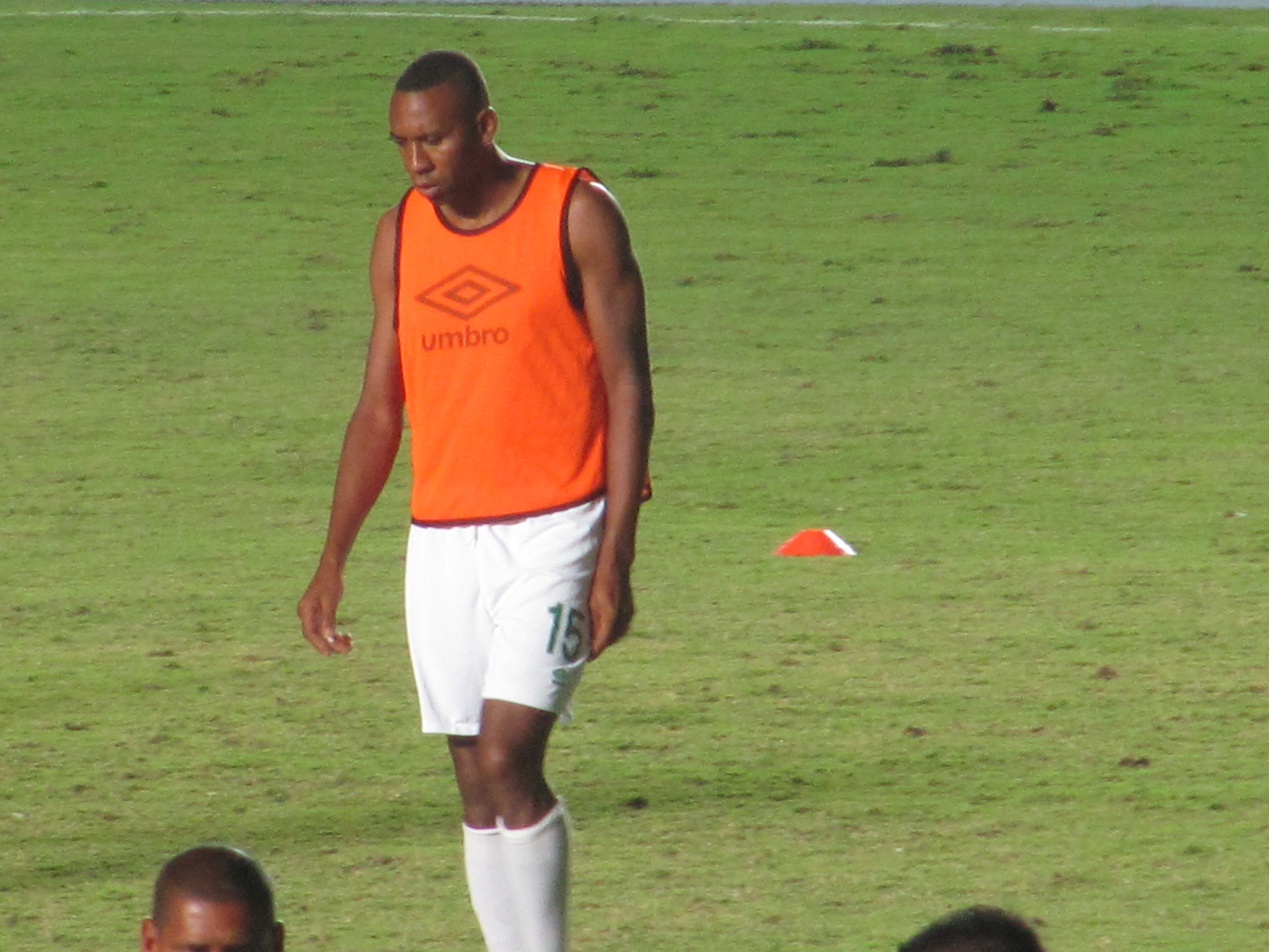 Jhon Viáfara. Partido entre el Glorioso Deportivo Cali y el américa, 2do ex-clásico de la Copa Colombia 2014 cuyo resultado fue un empate a 0.